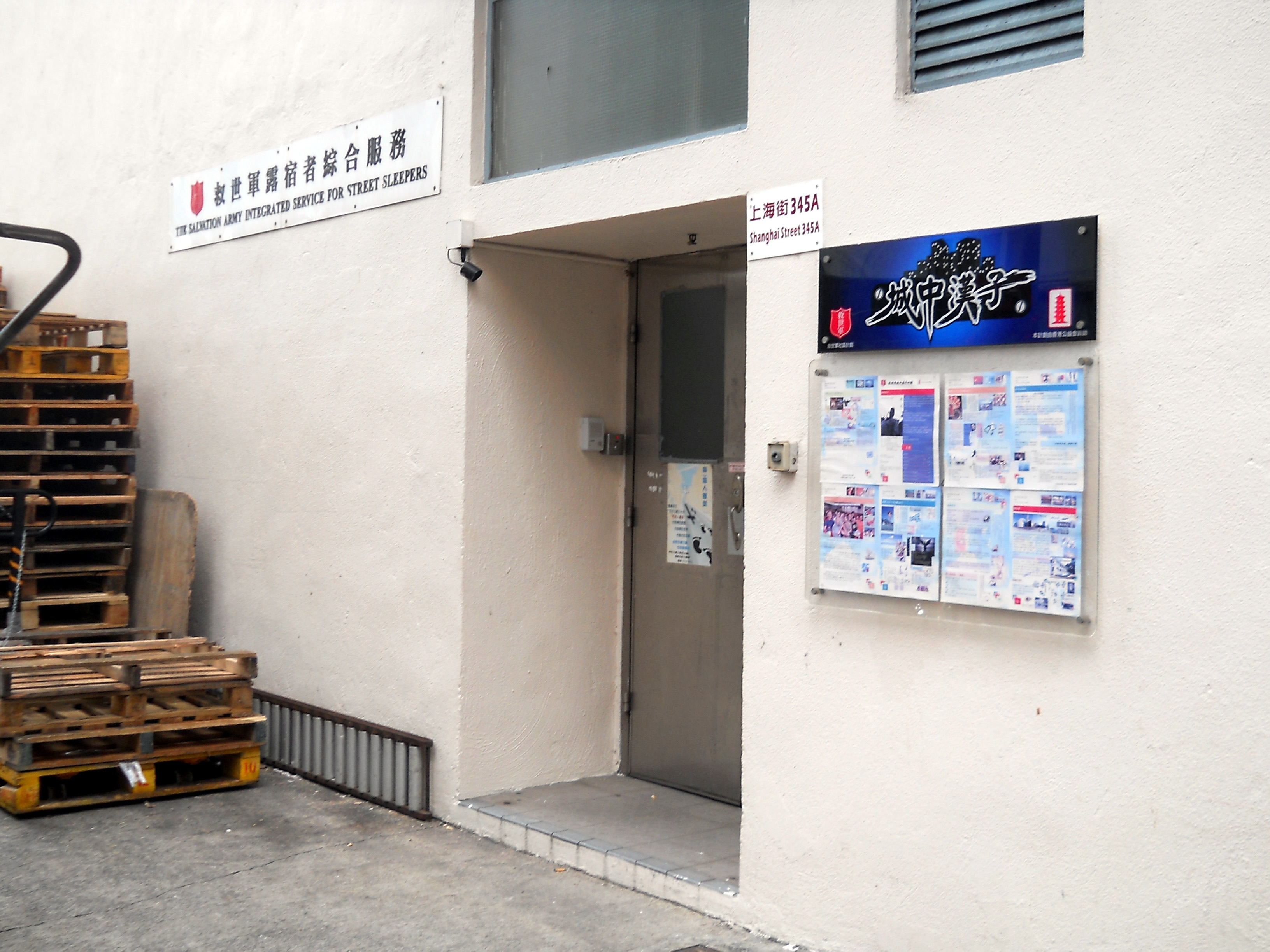 中文（香港）: 救世軍港澳軍區露者宿綜合服務